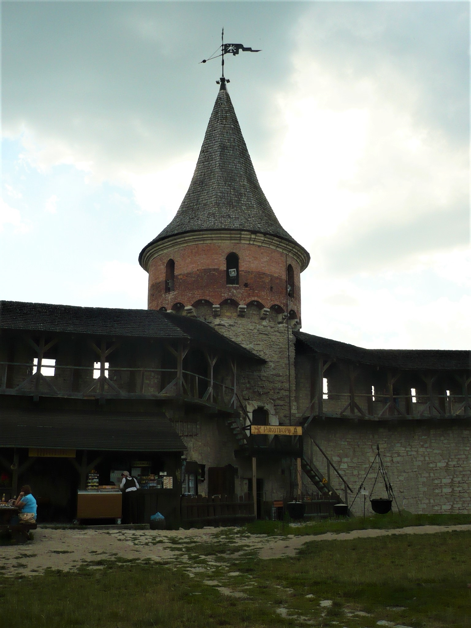 Twierdza w Kamieńcu Podolskim. Baszta Tęczyńska